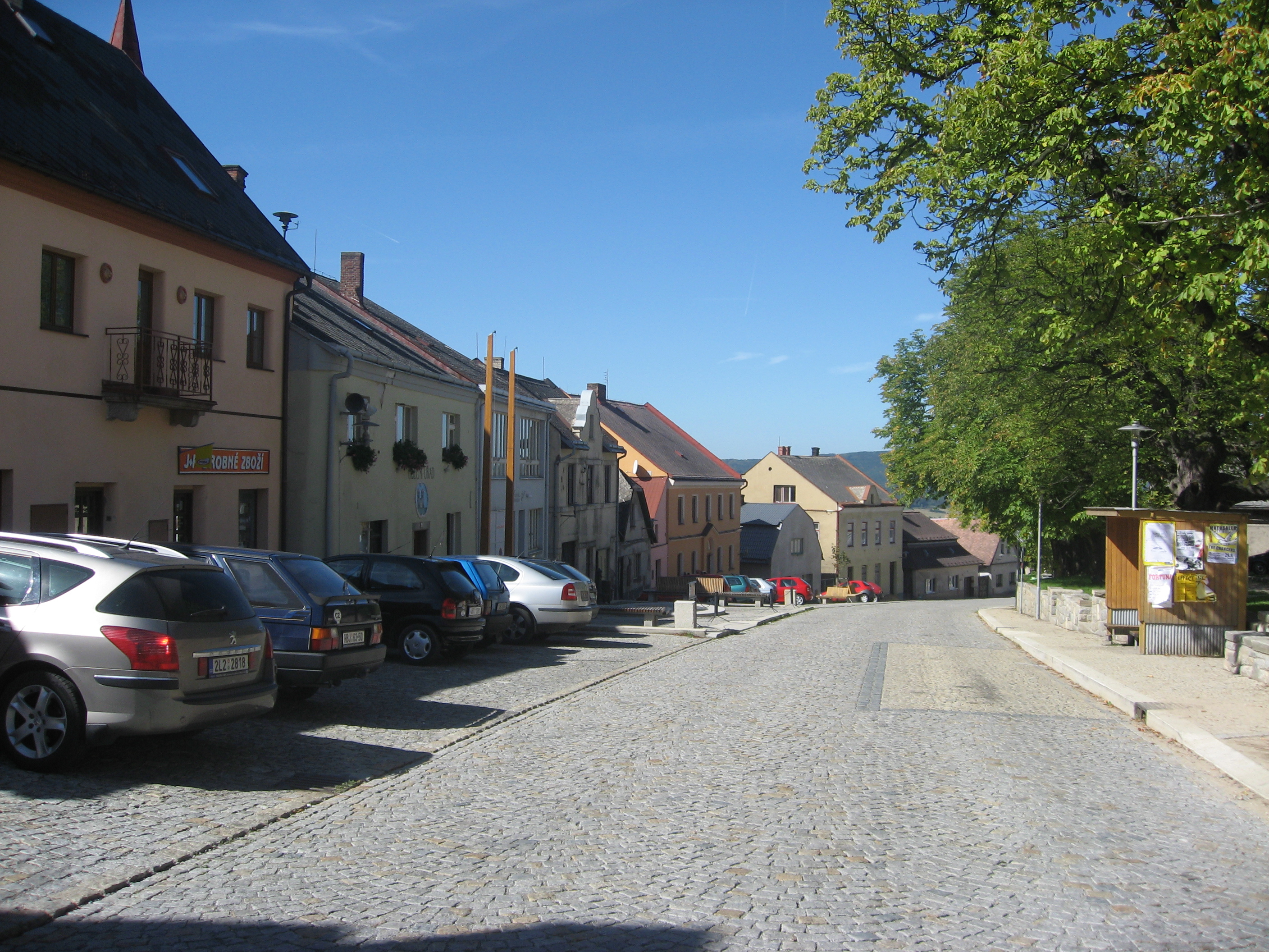 Lipnice nad Sázavou, náměstí